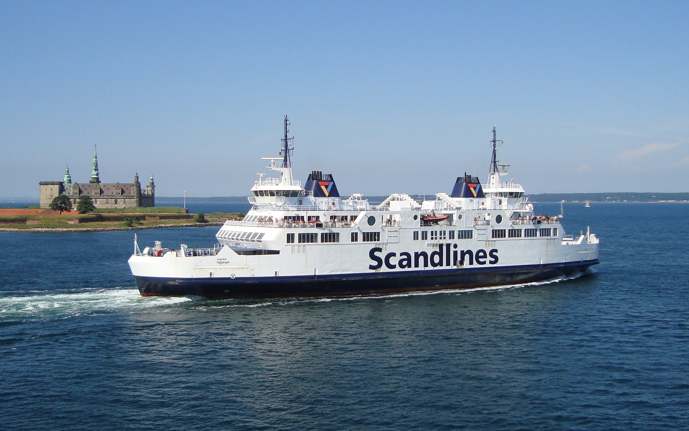 Scandlinesfärjan M/S Hamlet med slottet Kronborg i bakgrunden.